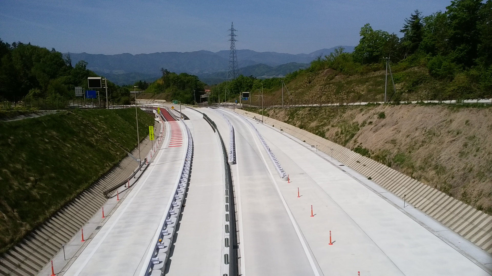 龍江ICの全景。